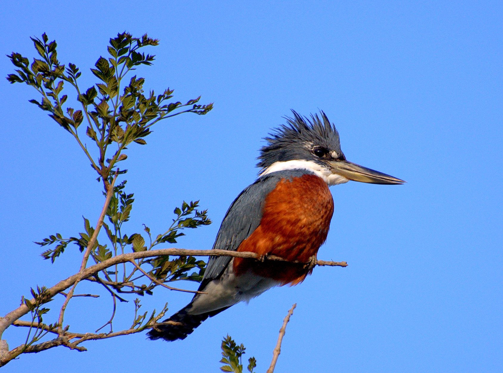 Megaceryle torquata, São Paulo Bagre no vale do Ribeira, próximo à cidade de Cananeia